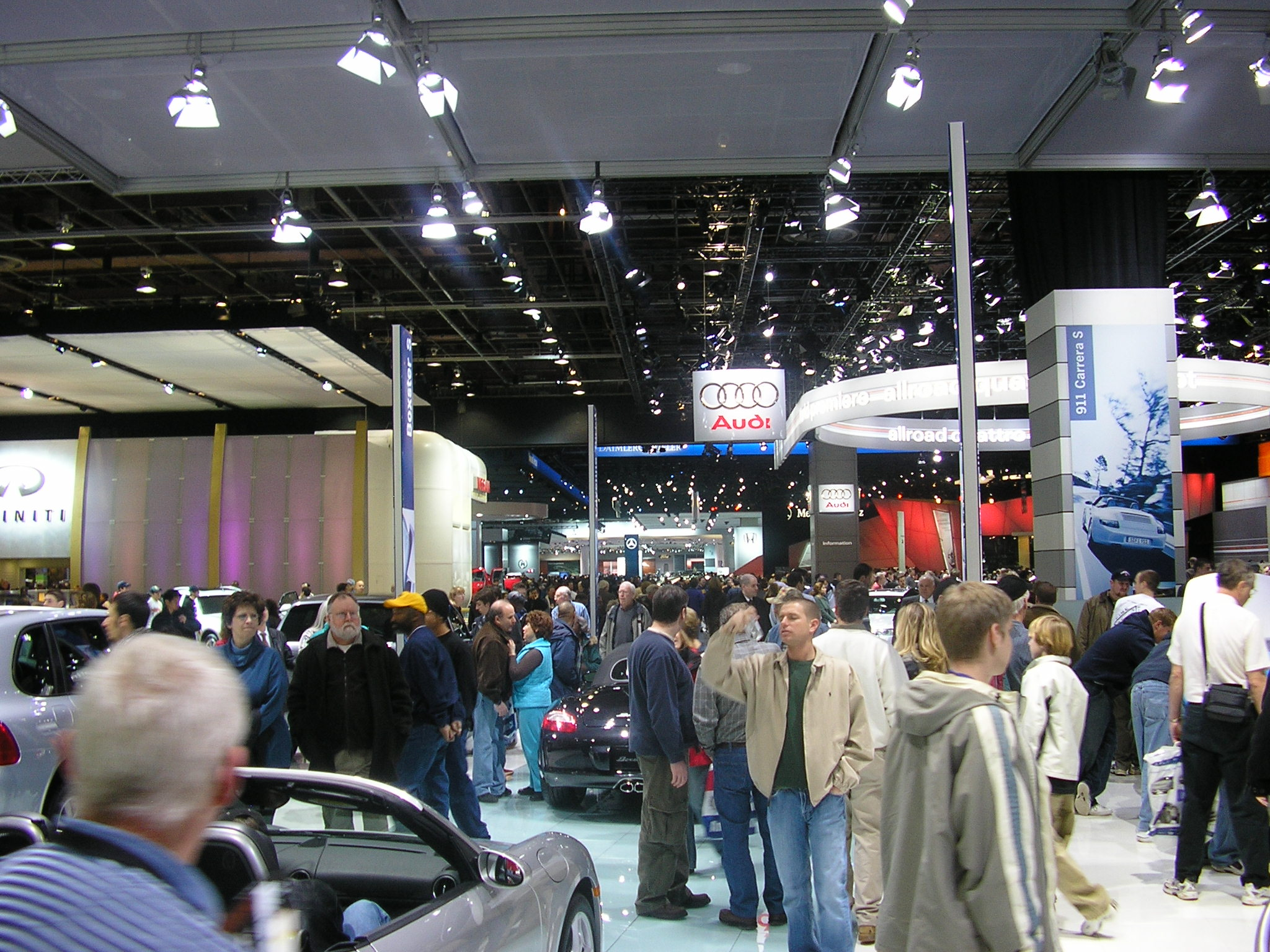 Image du salon NAIAS en 2005